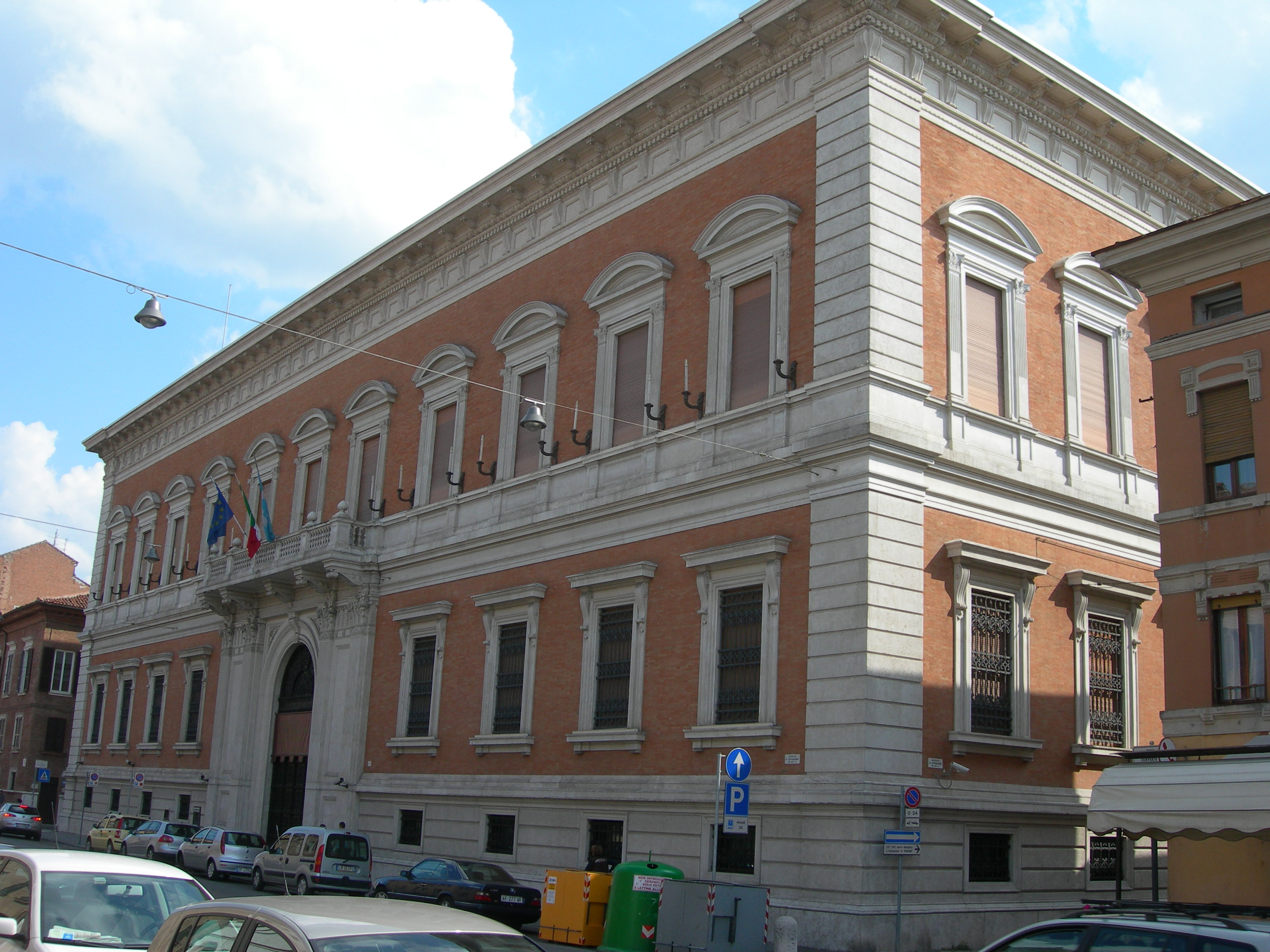 Il palazzo della Carife a Ferrara.